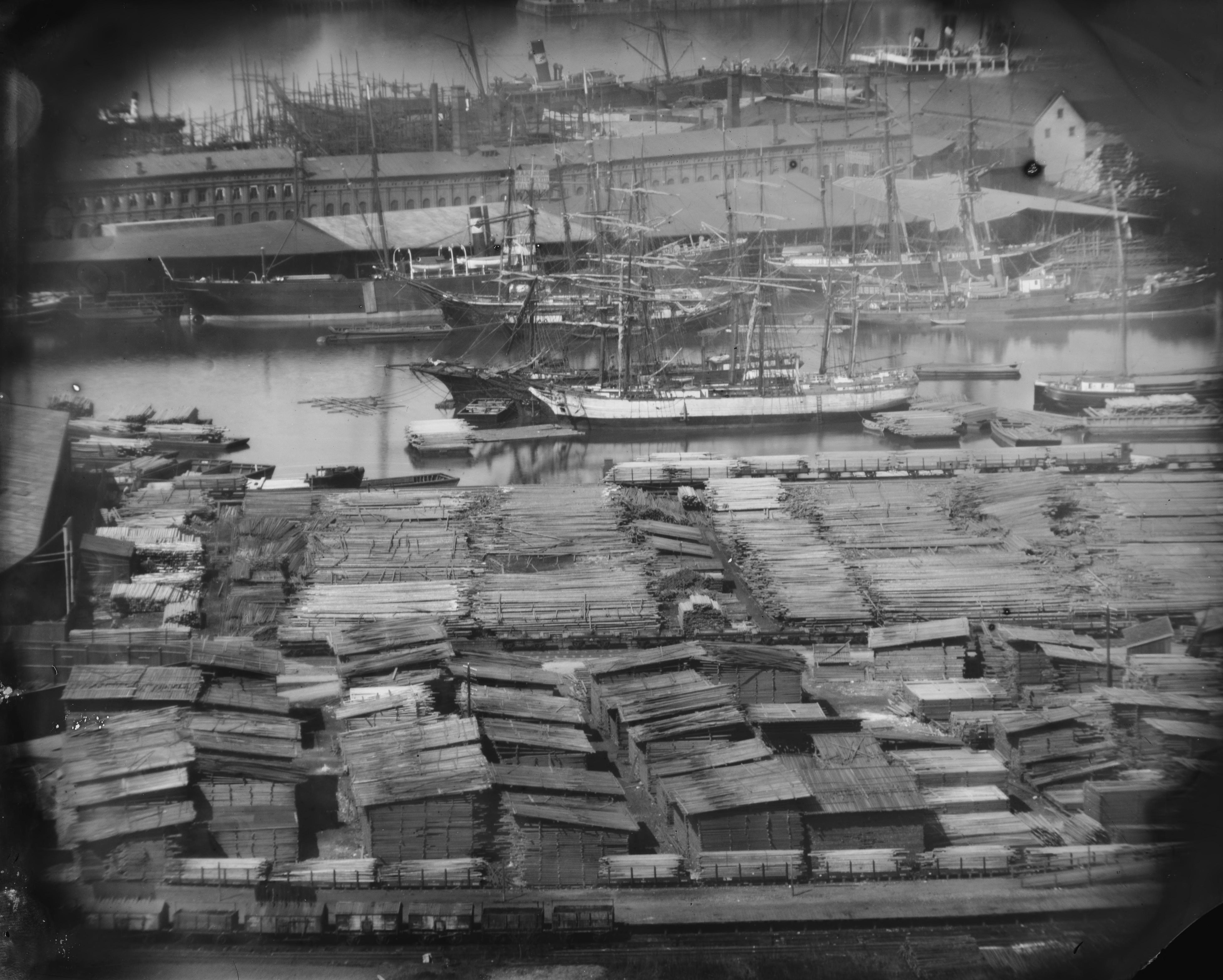 Påskrift konvolutt: B-1 Oslo havn. Bispevika med Nylands mek. verksted. [Riksantikvaren] Sted: Bispevika,Bjørvika,Oslo havn Kommune: Oslo Fylke: Oslo Tagger: havn båter Nylands mekaniske verksted skipsverft fabrikk